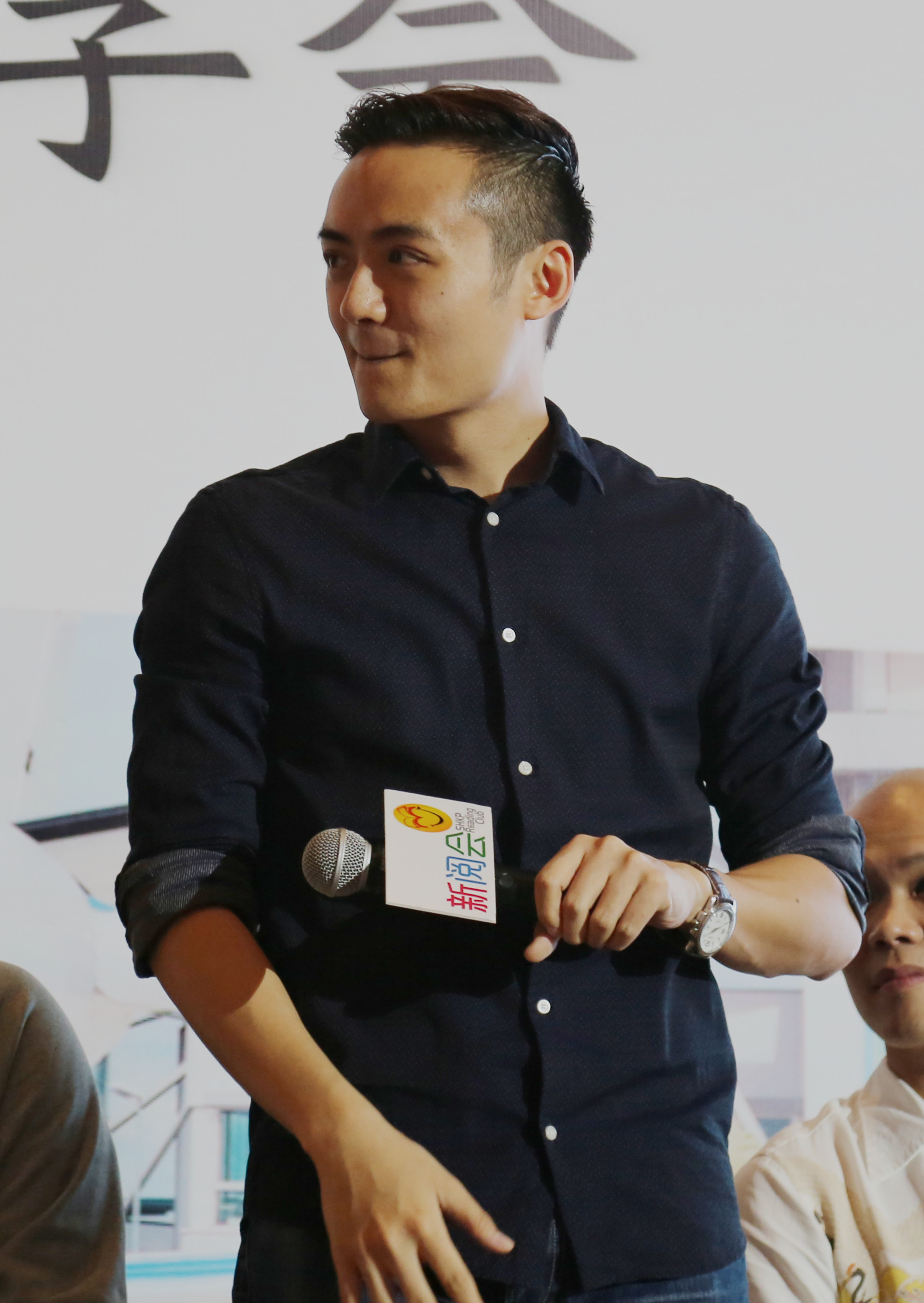 2017年於上海出席記者招待會